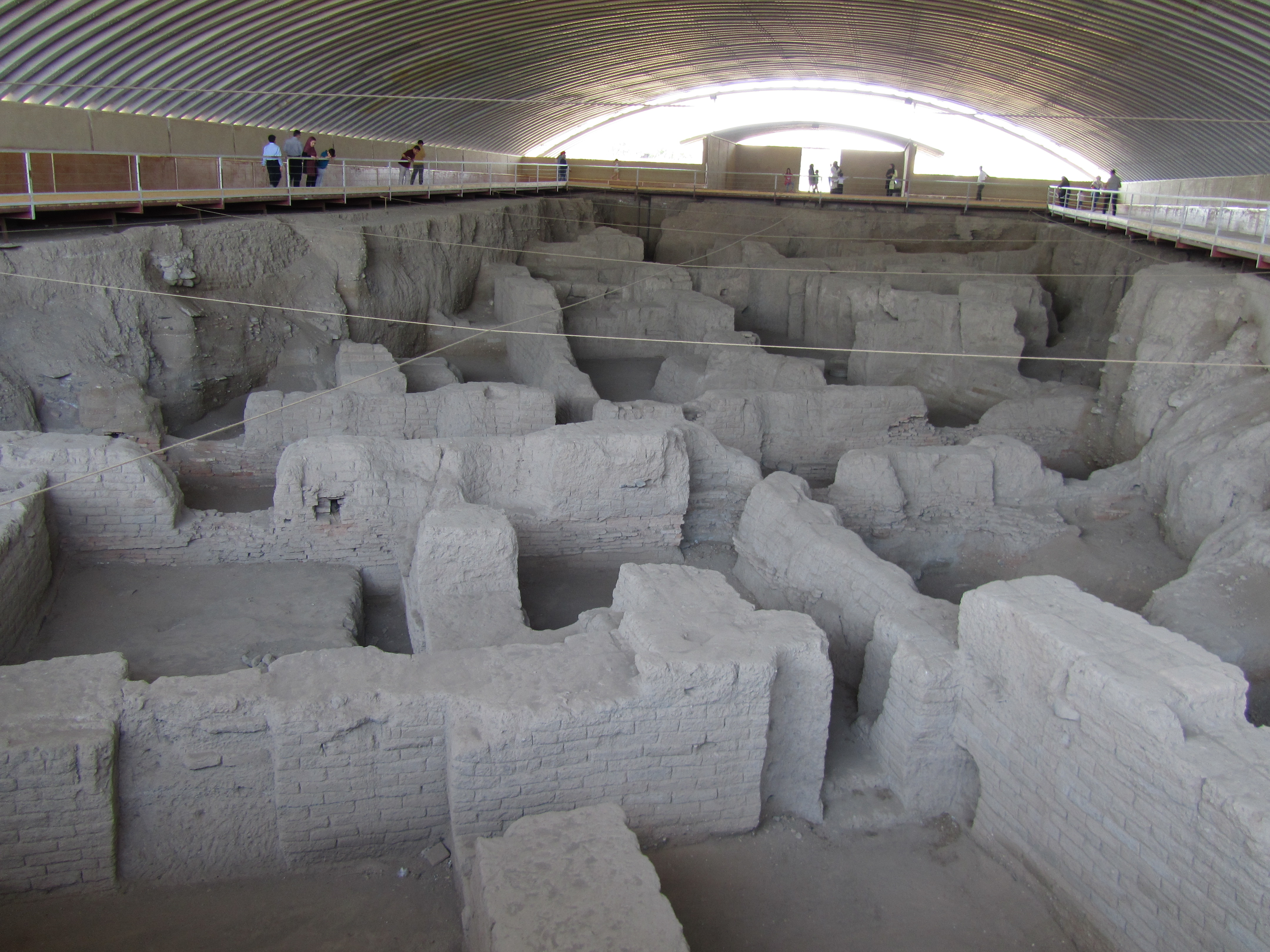 محل اکباتان قدیم و اطراف آن